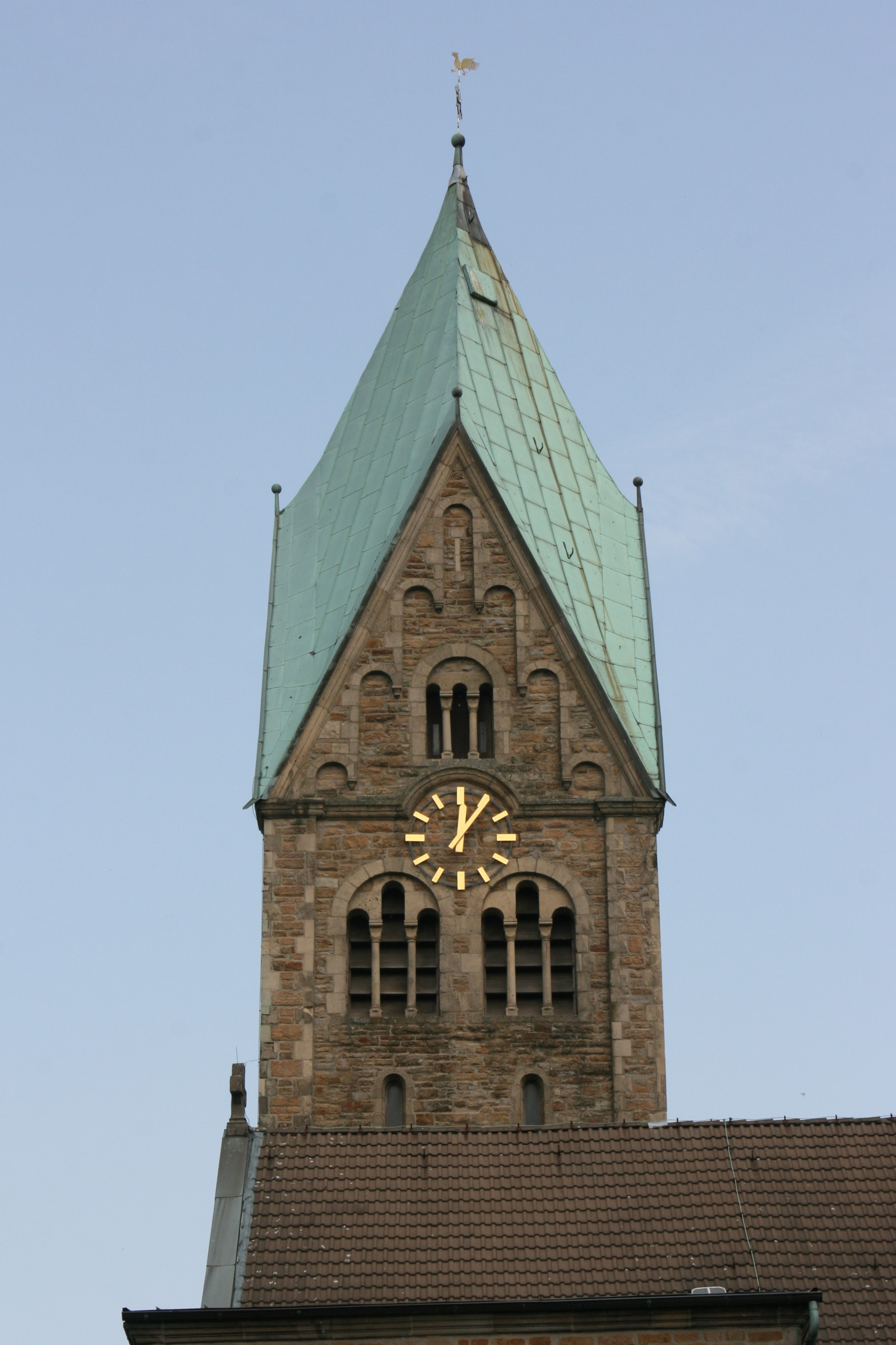 Kirche Herz Jesu, Alte Hauptstraße in Essen-Burgaltendorf